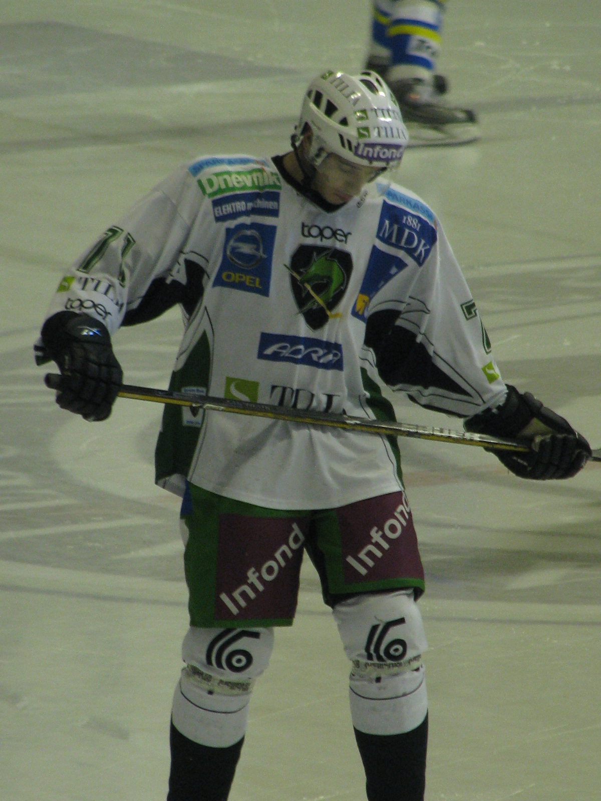 Boštjan Goličič